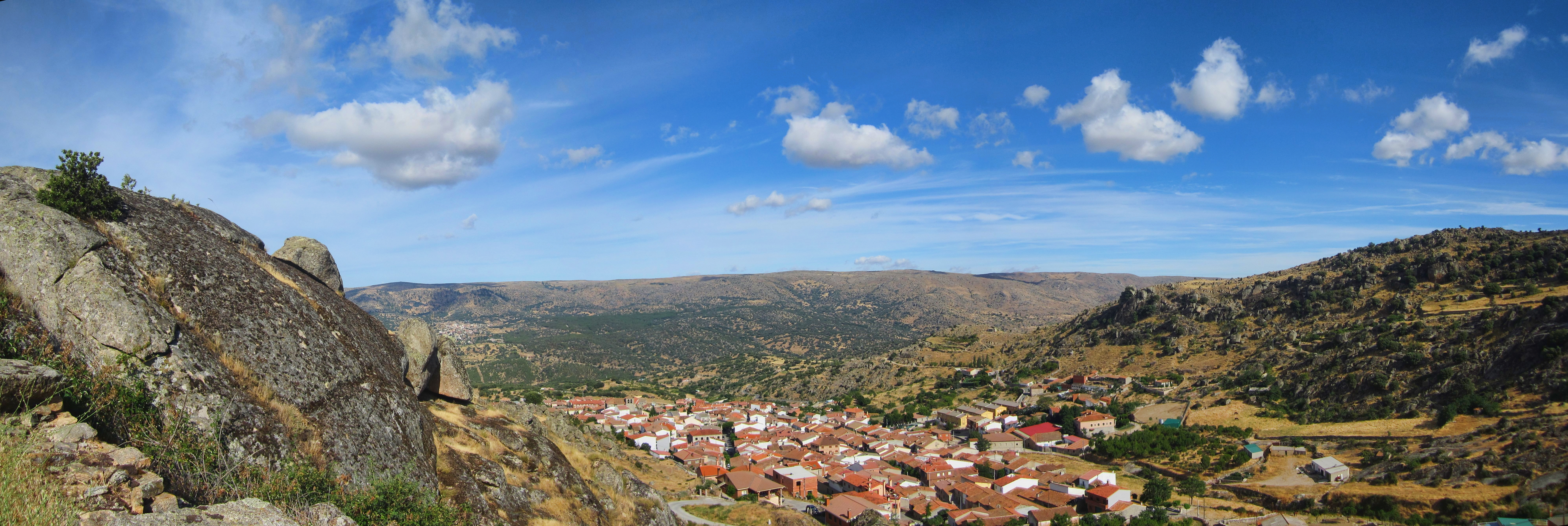 Vista panorámica de San Bartolomé de Pinares, municipio de Ávila, España.